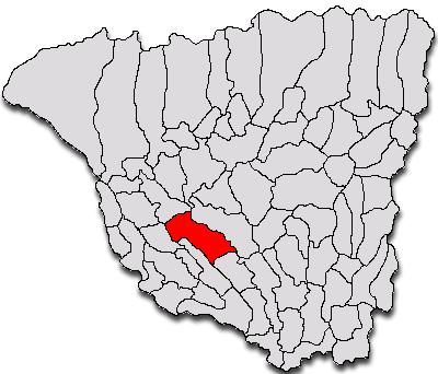 Categorie:Hărţi ale judeţului Gorj